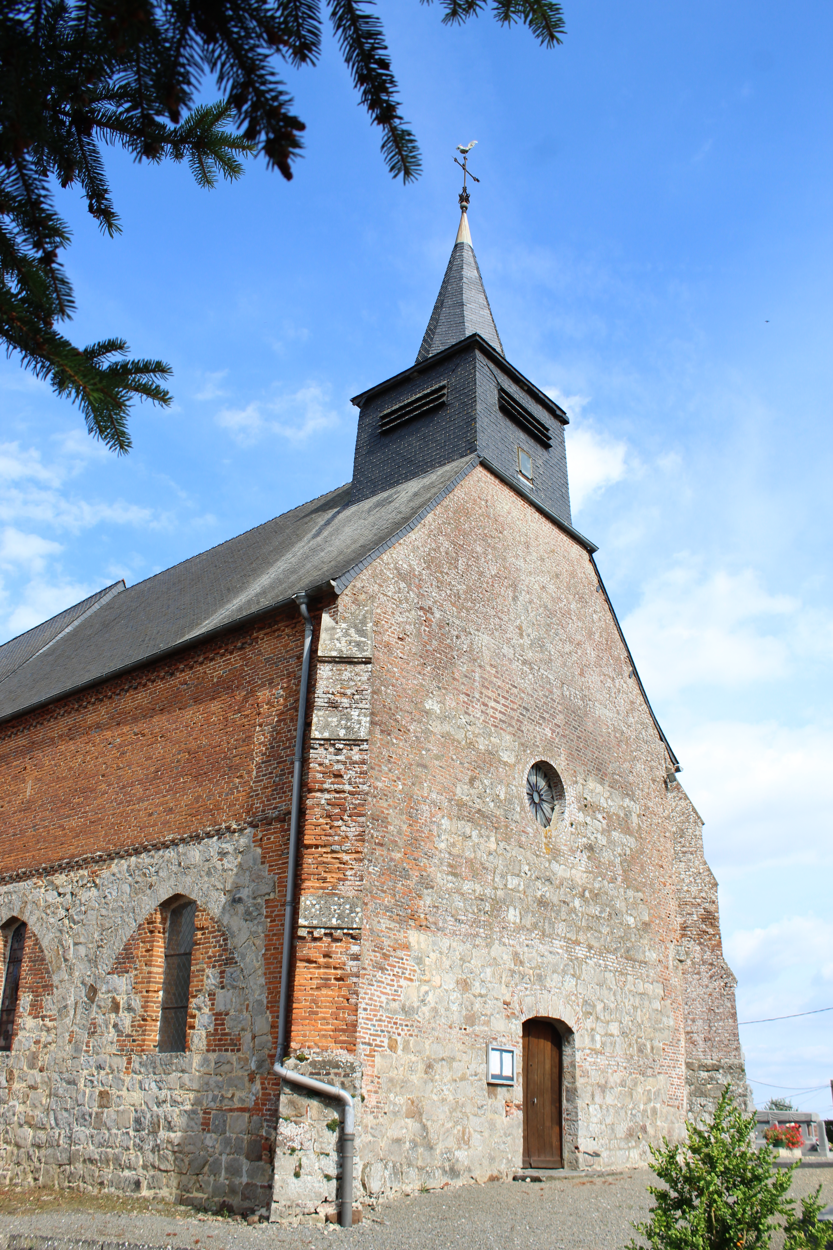 L'église